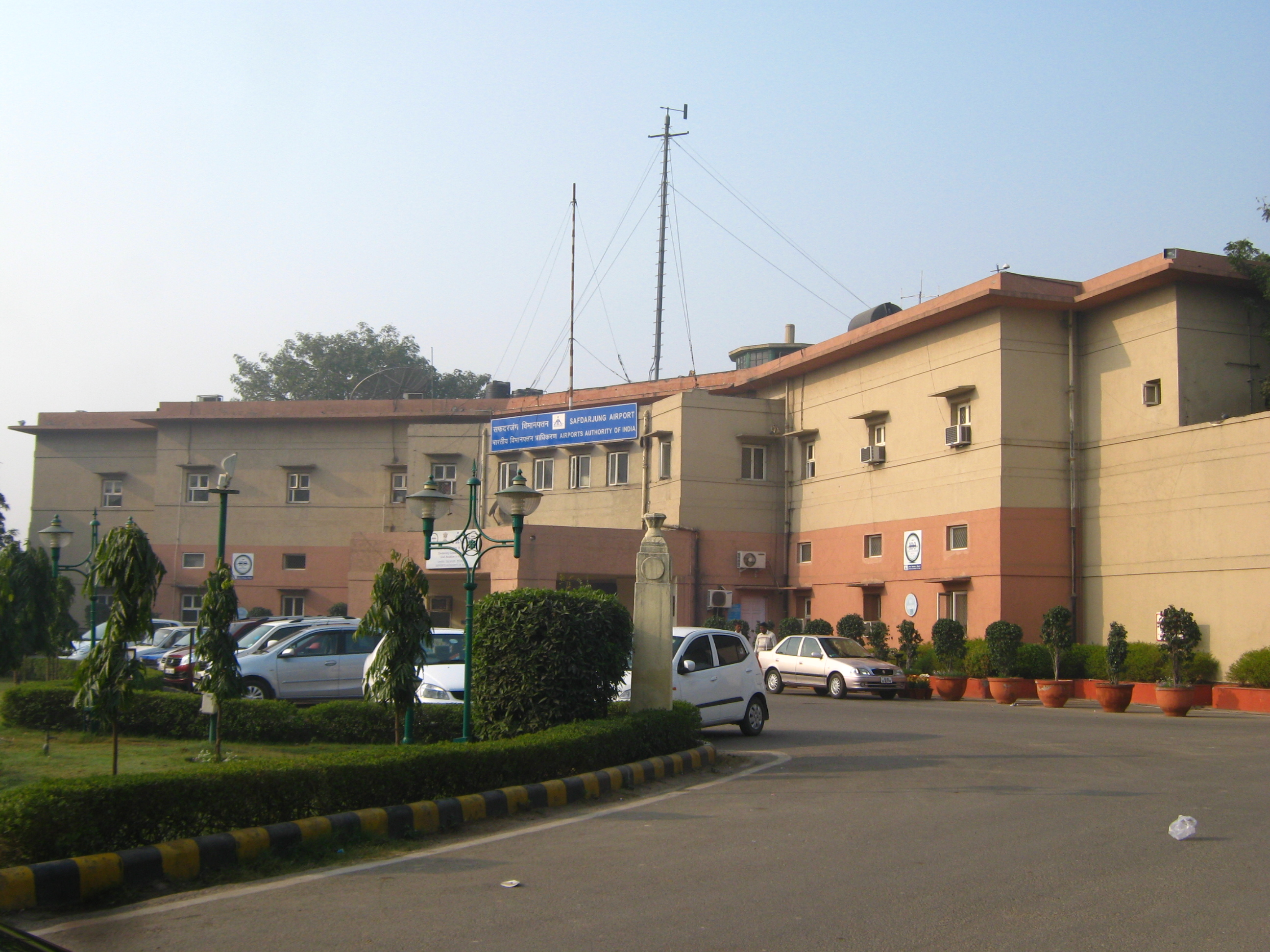 Safdarjung Airport Term Bldg 2